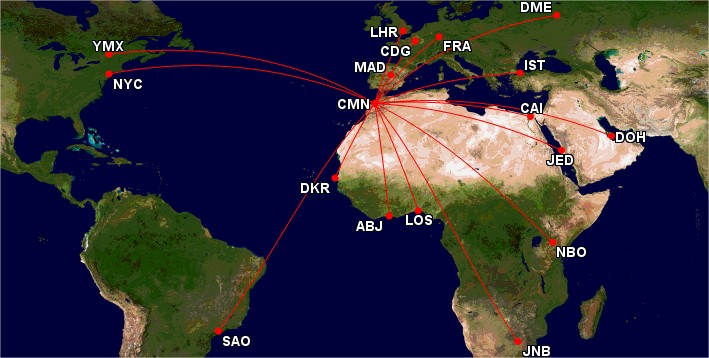 dessertes de la RAM des principaux hubs aériens